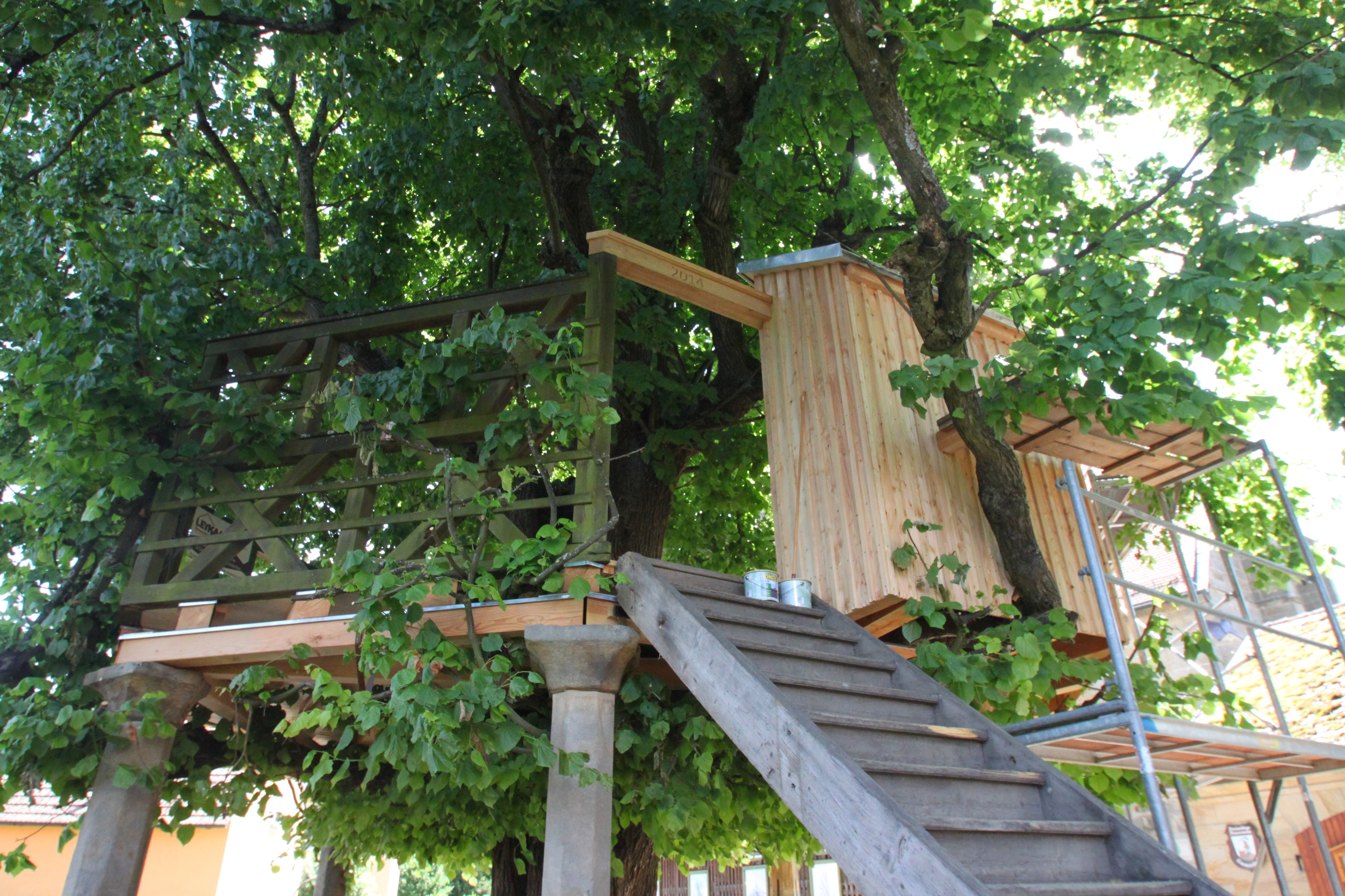 Die Tanzlinde in Limmersdorf einem Ortsteil von Thurnau. Mit achtseitigem Tanzbogen auf oktogonalen Hausteinpfeilern, bezeichnet „1729“. Baudenkmal D-4-77-157-89